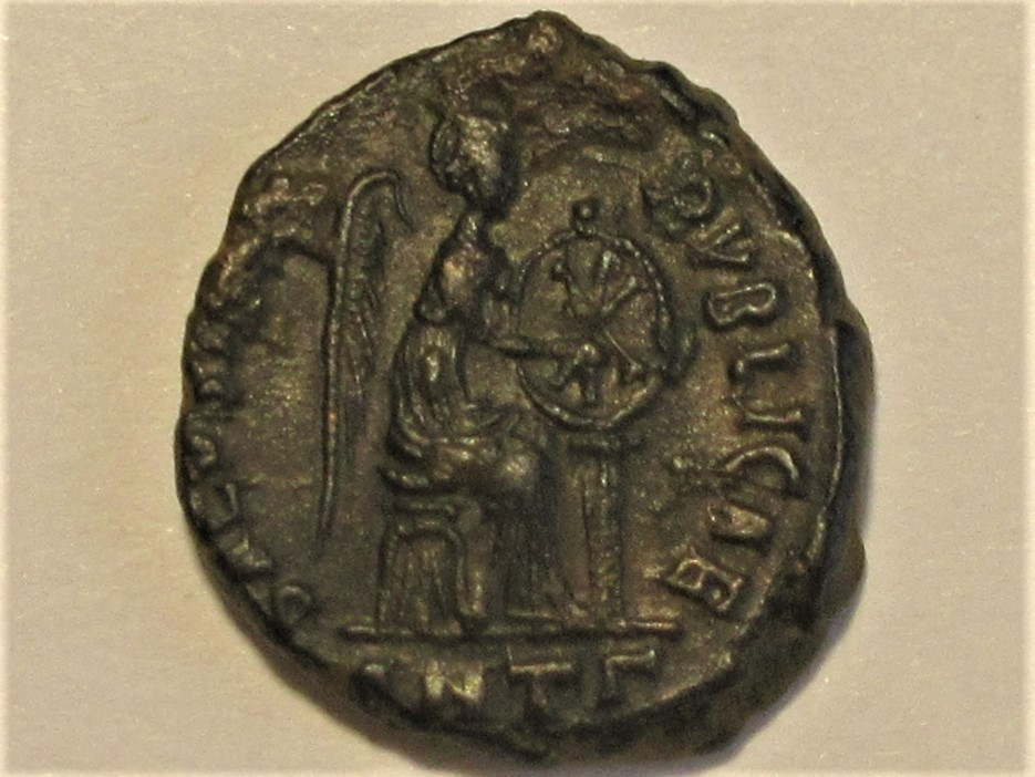 Rückseite der Münze: Victoria einen Schild mit Christogramm beschreibend